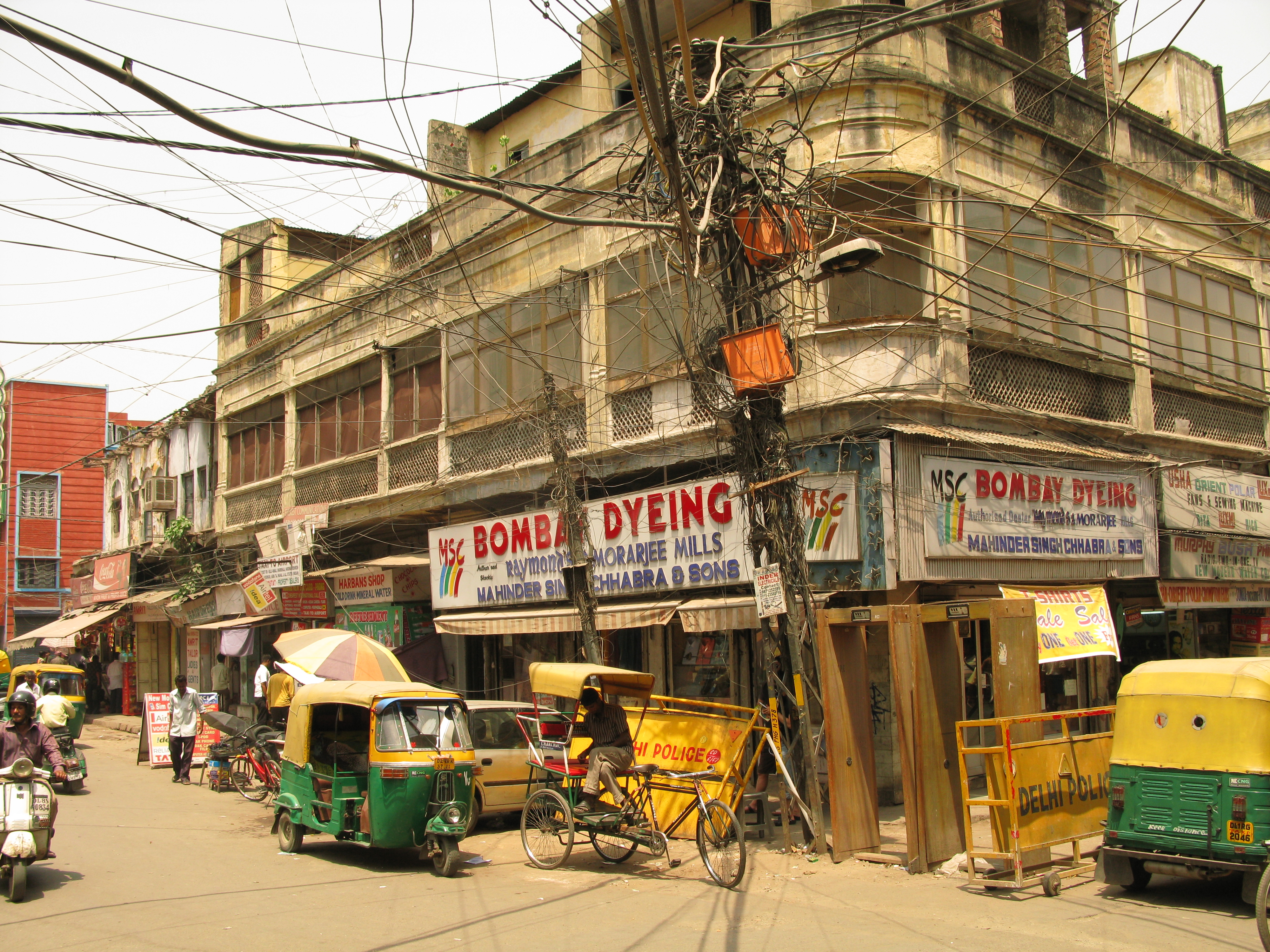 India New Delhi Pahar Ganj